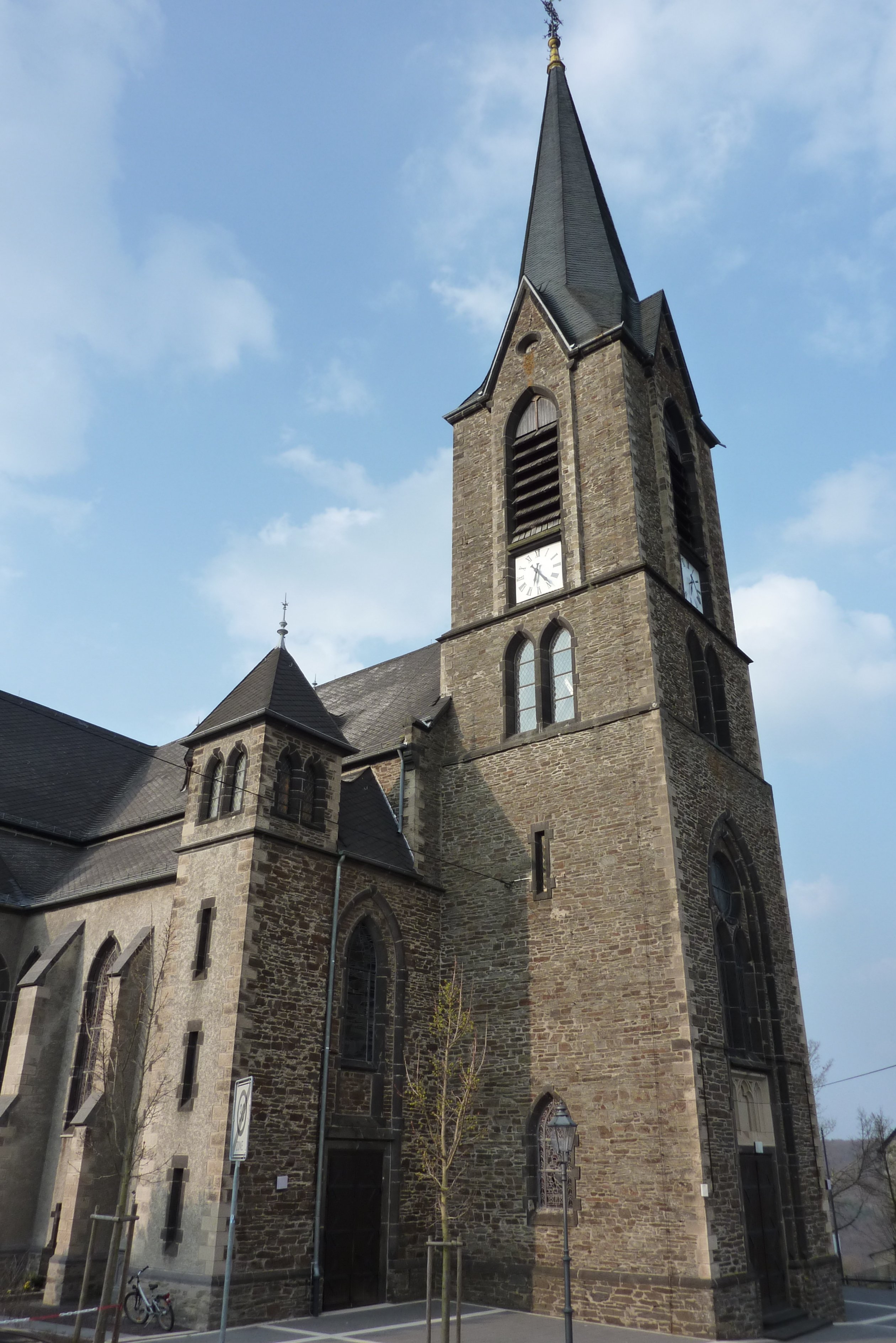 katholische Pfarrkirche St. Quirinus in Langenfeld (Eifel)